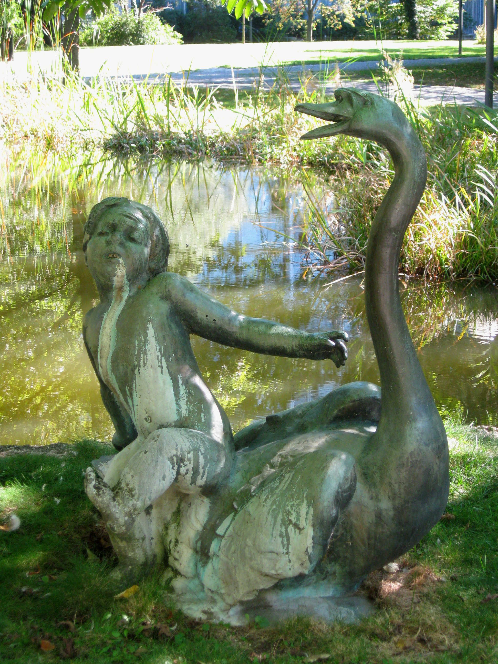 Lothar Dietz: Junge mit Schwan (1953), Tucherpark, München